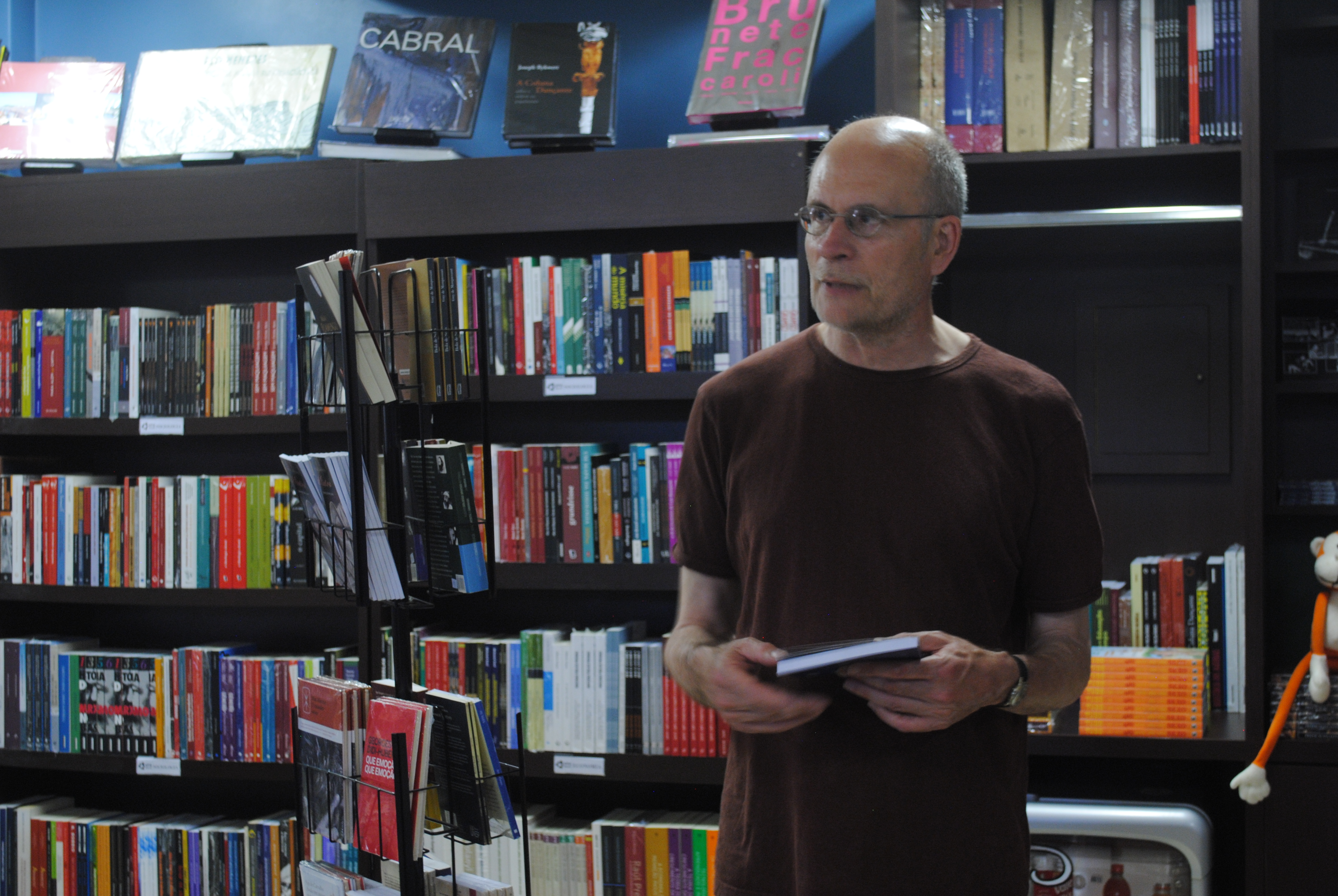 Exposição de Luc Vankrunkelsven na Universidade Federal de Goiás, em 2016.